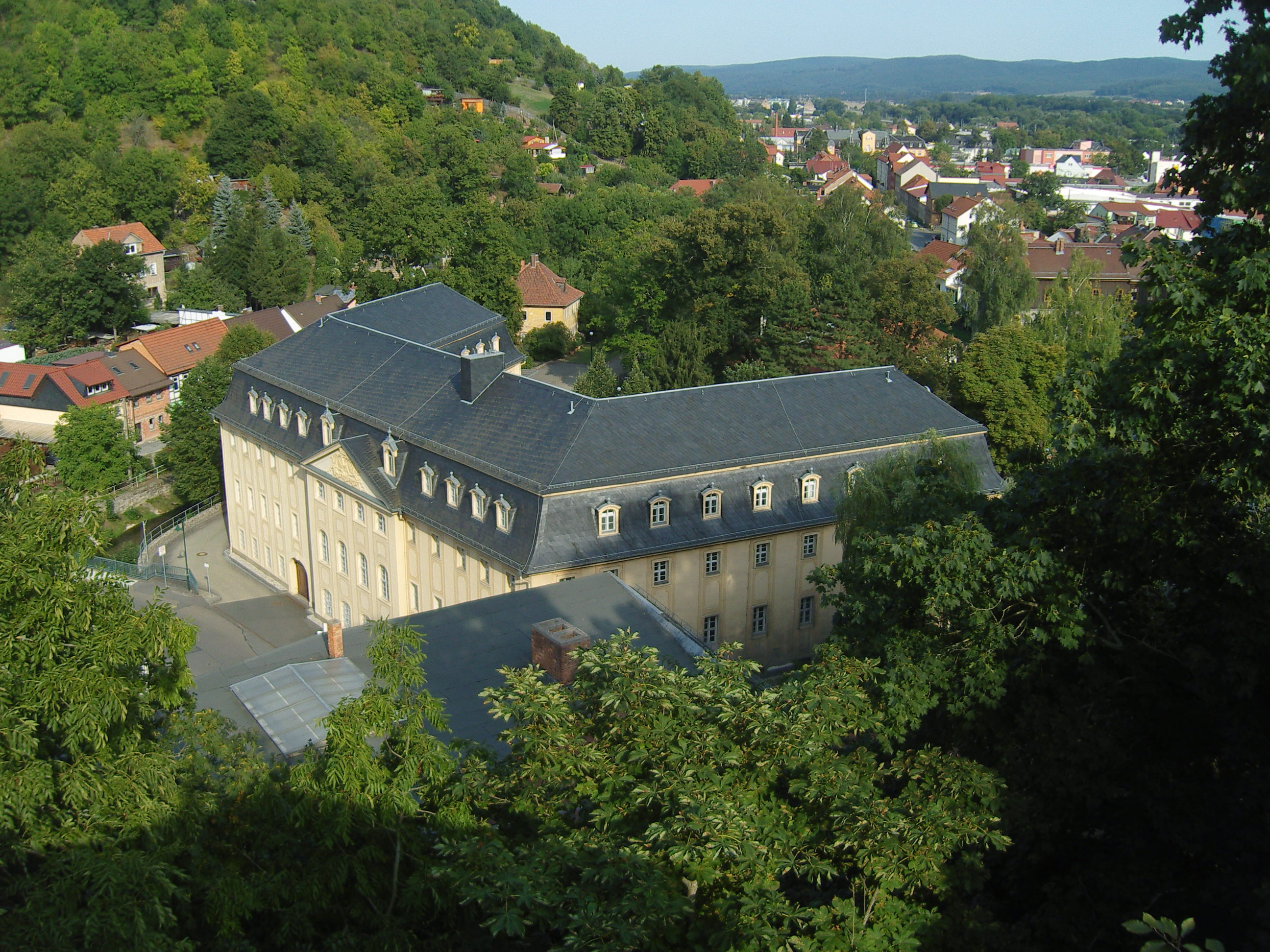 Blick von der Heidecksburg auf die Ludwigsburg in Rudolstadt; Sitz des Landesrechnungshof